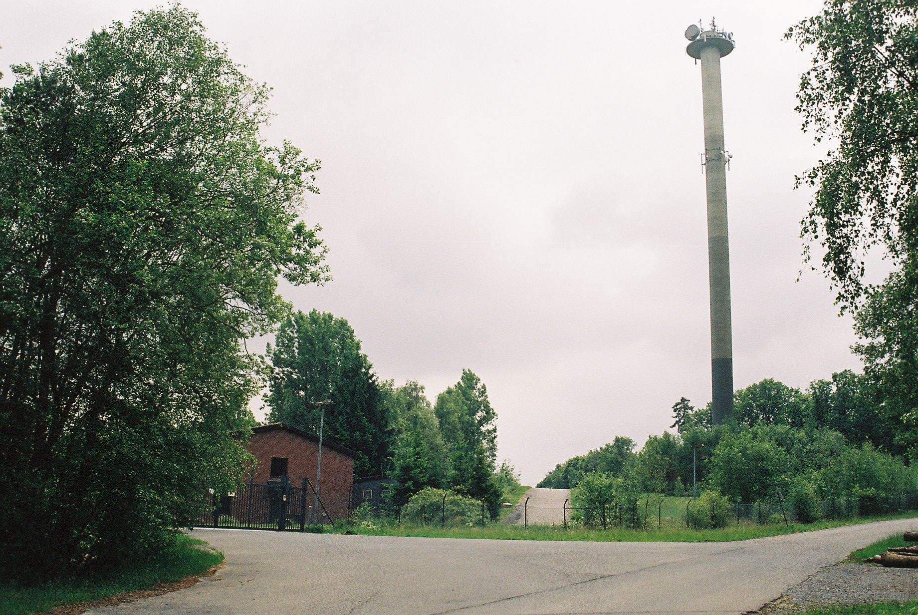 Aufgelassene amerikanische Raketenstellung auf dem Nutscheid bei Waldbröl